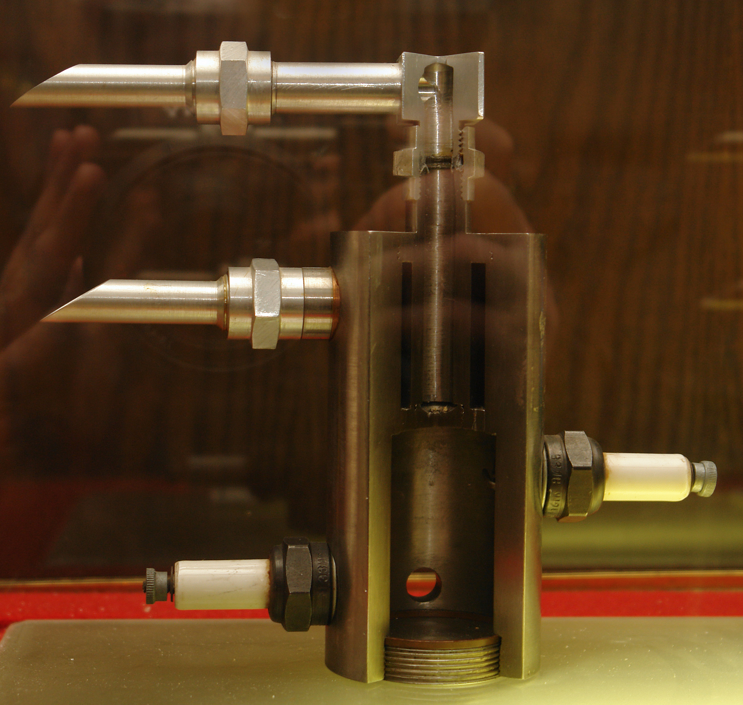 Экспериментальный жидкостный ракетный двигатель ОРМ-4. Музей космонавтики и ракетной техники; Санкт-Петербург. This photograph was taken in Museum of Space and Missile Technology (Saint Petersburg) Object location59° 57′ 07″ N, 30° 19′ 16″ E